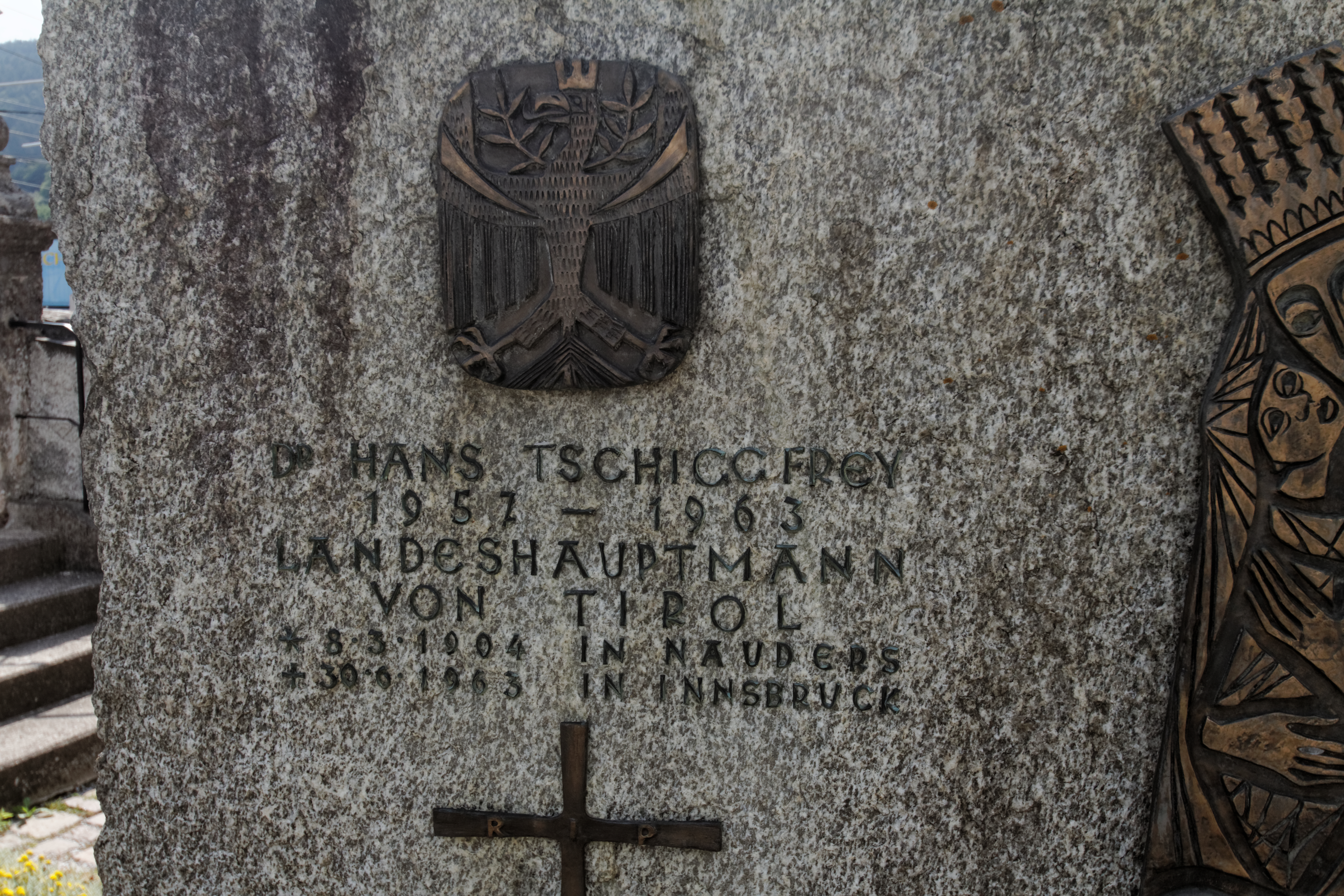 Grabmal Hans Tschiggfrey; Basilika Unsere Liebe Frau von der unbefleckten Empfängnis in Innsbruck-Wilten